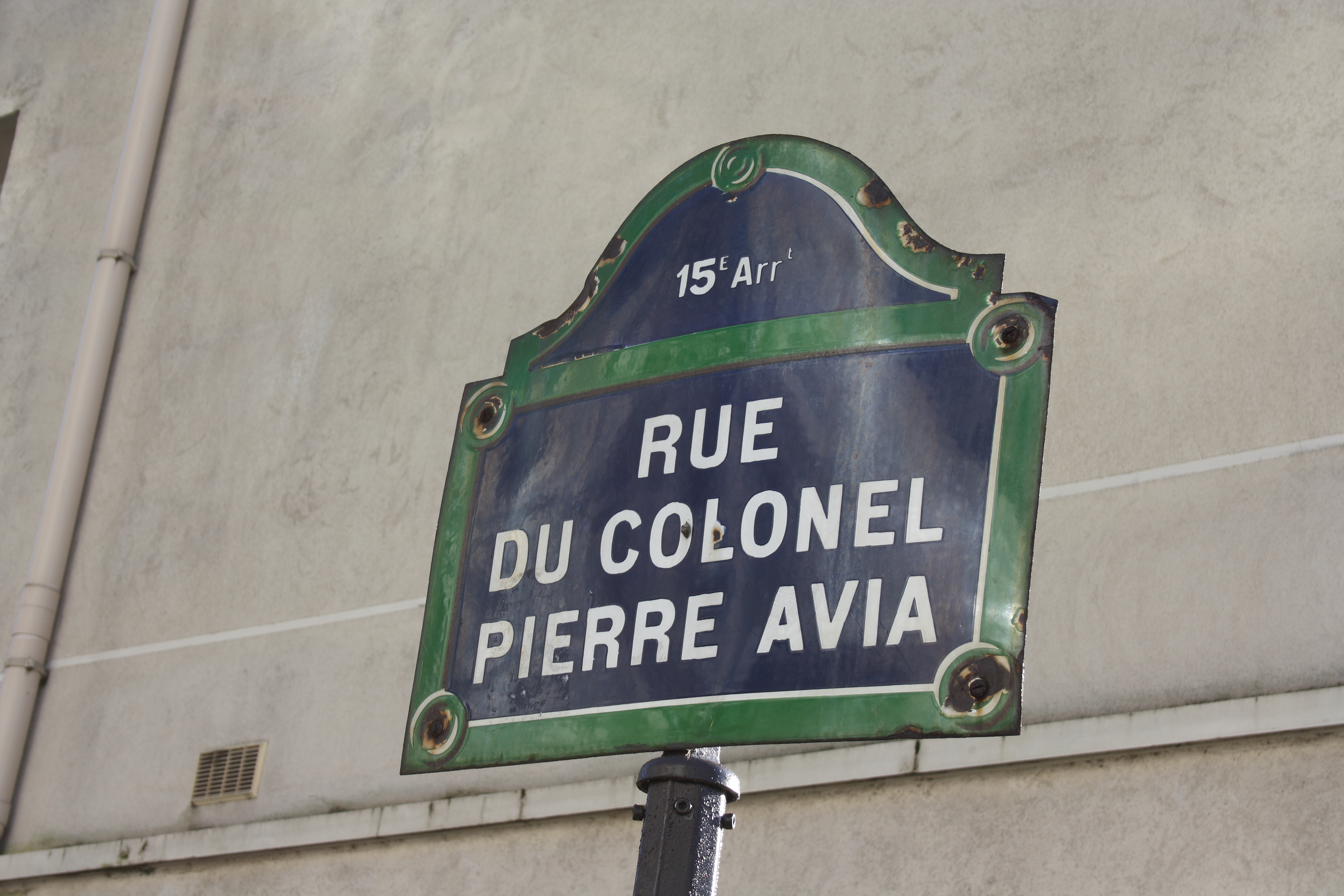 Straßenschild RUE DU COLONEL PIERRE AVIA im 15. Arrondissement in Paris (Île-de-France/Frankreich)